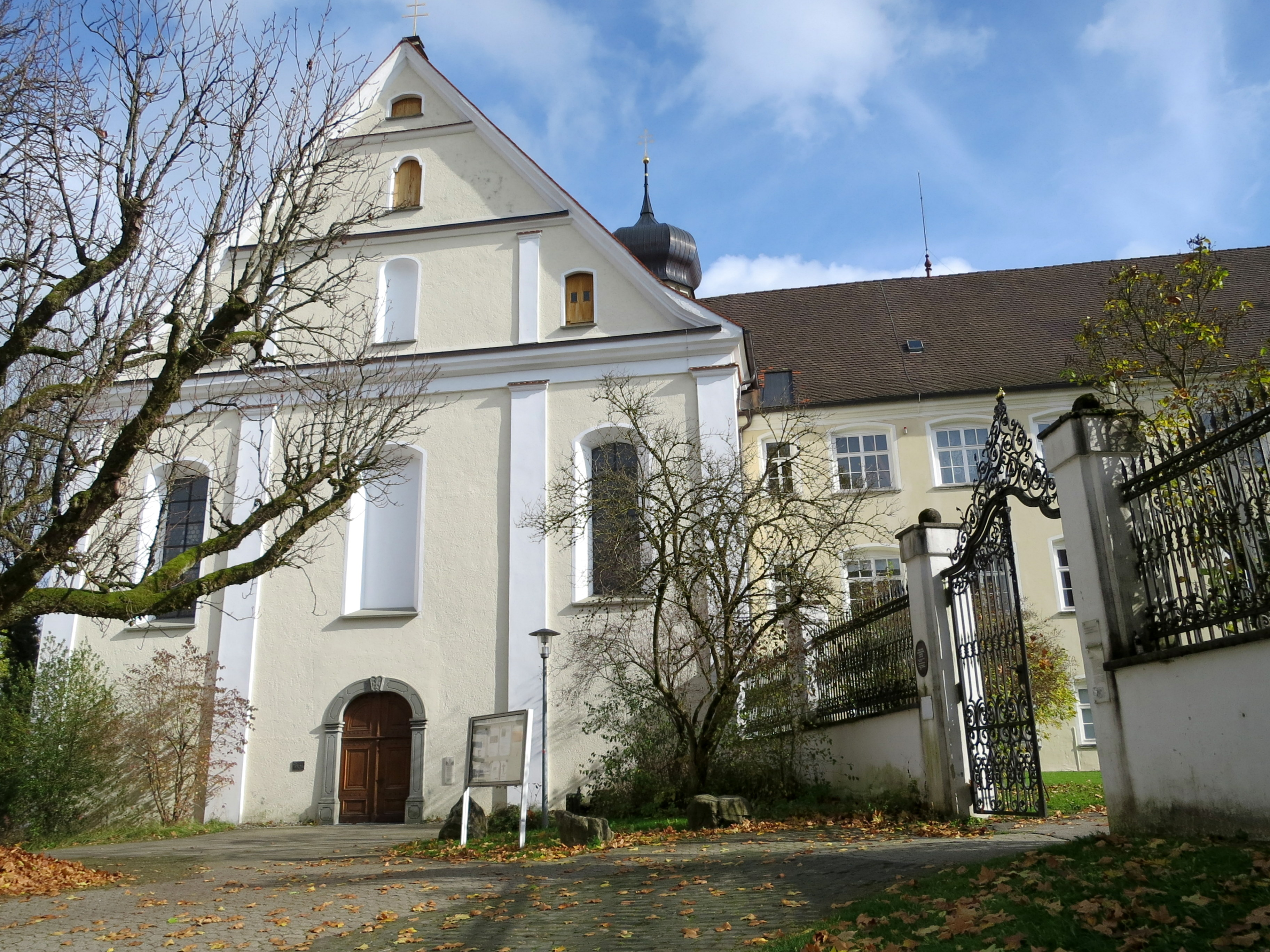 Fassade von St. Georg und Jakobus